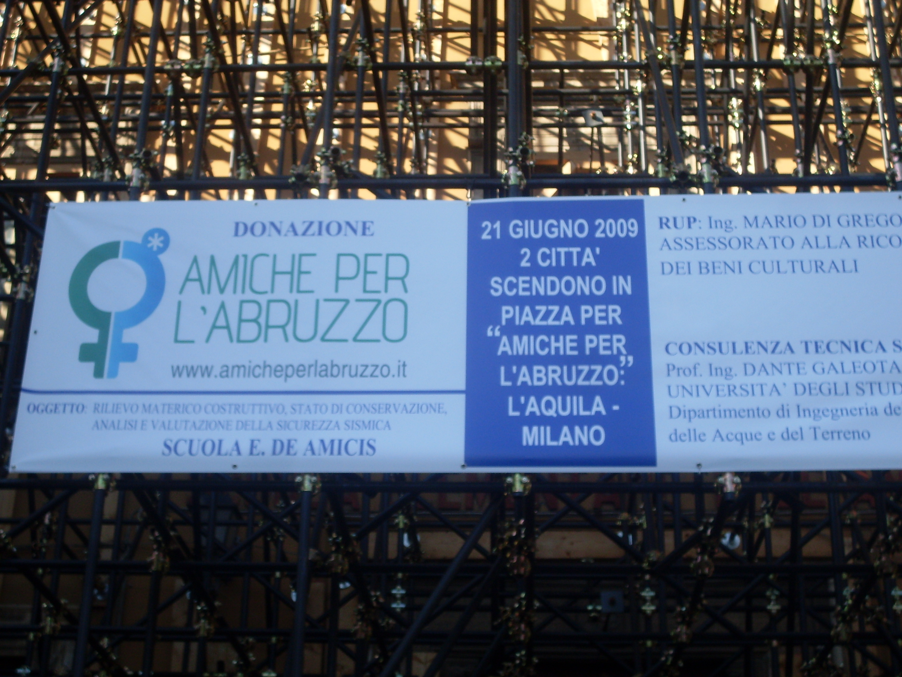 Lavori di ricostruzione della Scuola elementare Edmondo de Amicis a L'Aquila grazie al contributo dell'evento benefico Amiche per l'Abruzzo